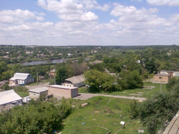 Центр Компаніївки (Кіровоградська область)